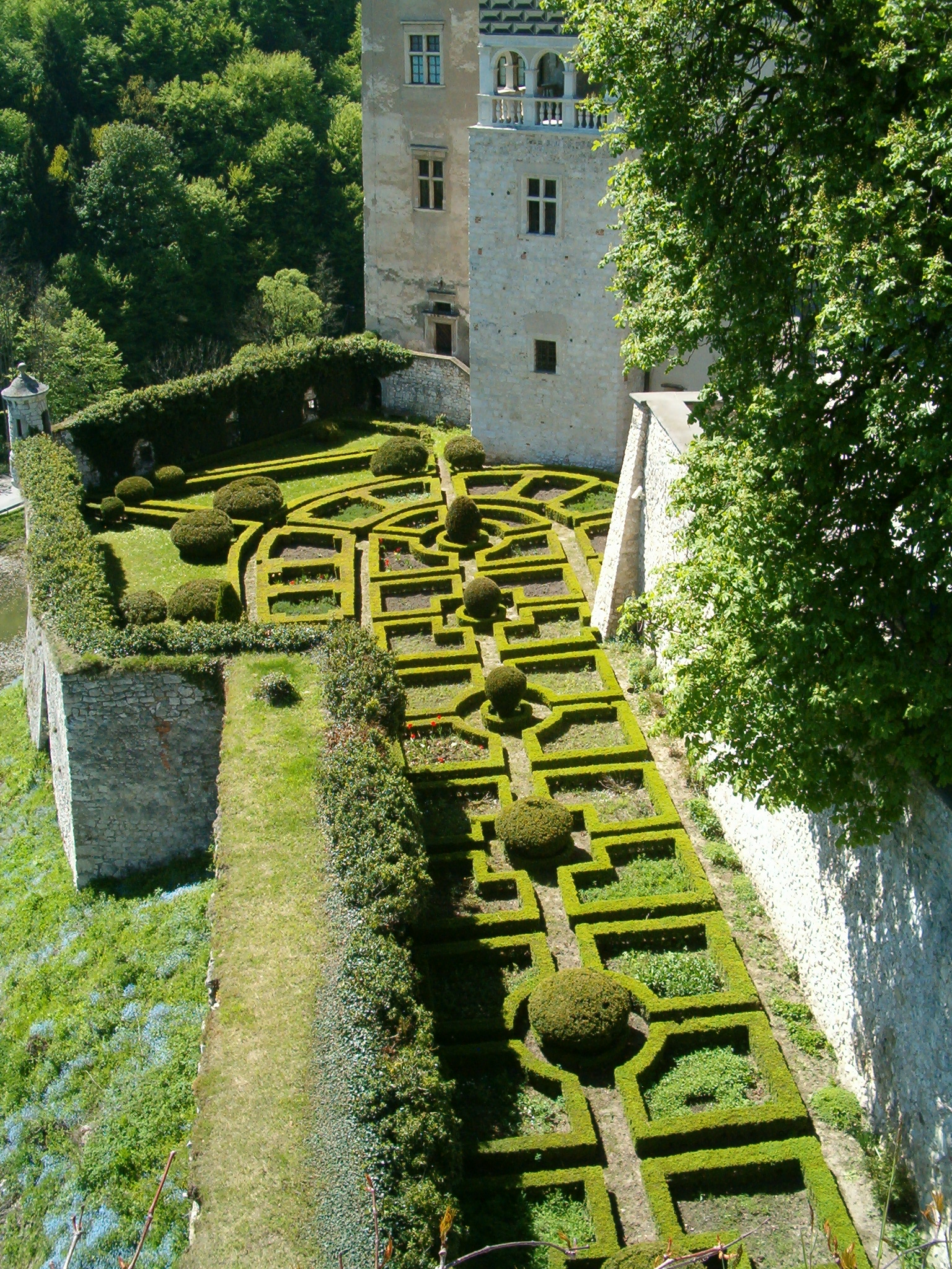 Ogrody zamku w Pieskowej Skale